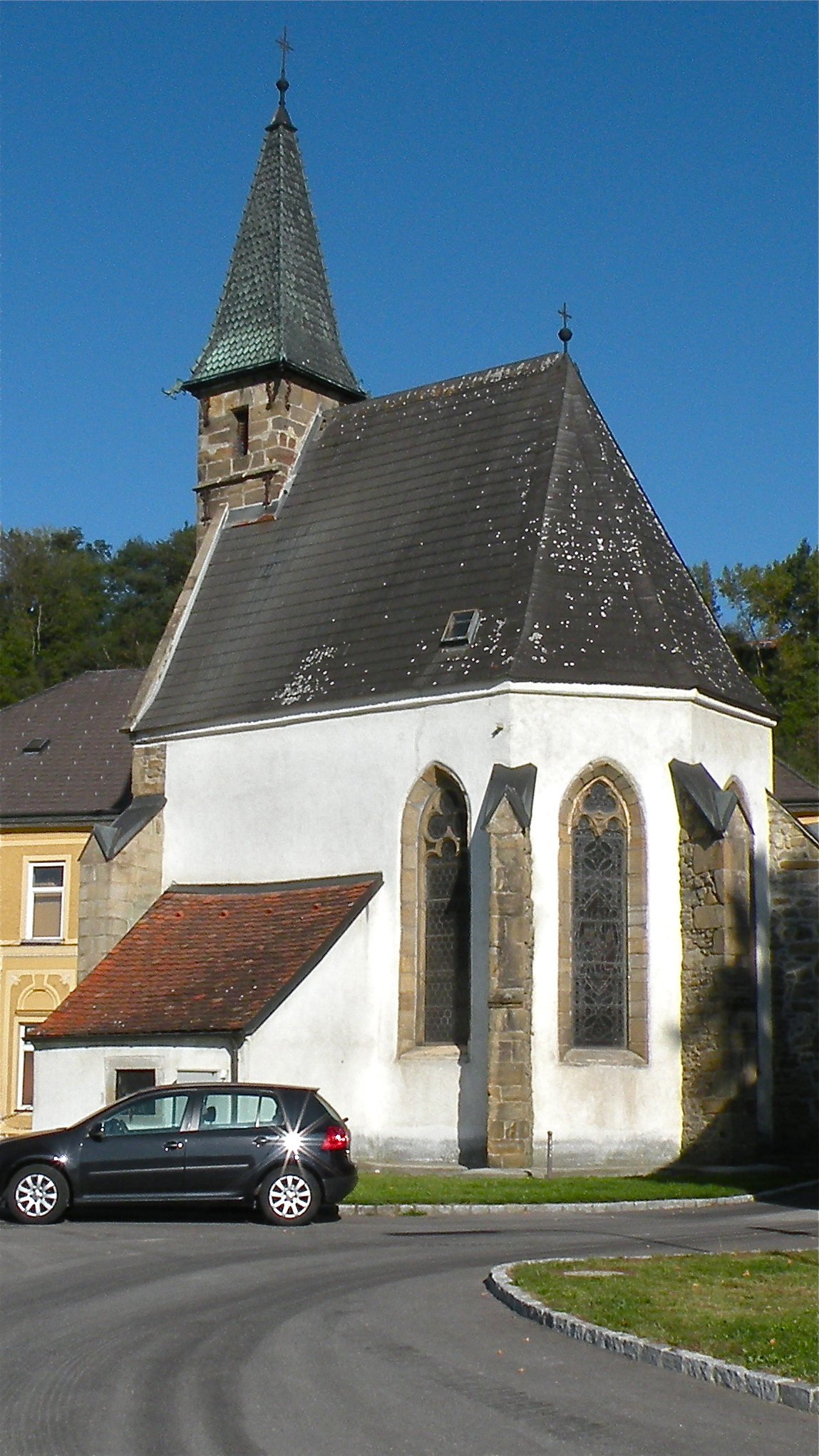 Ehemalige Wallfahrtskirche Maria Trost und Aufbahrungshalle Heinrichskirche in Mauthausen im Bezirk Perg in Oberösterreich